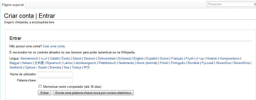 Imagem da página de login da Wikipedia.